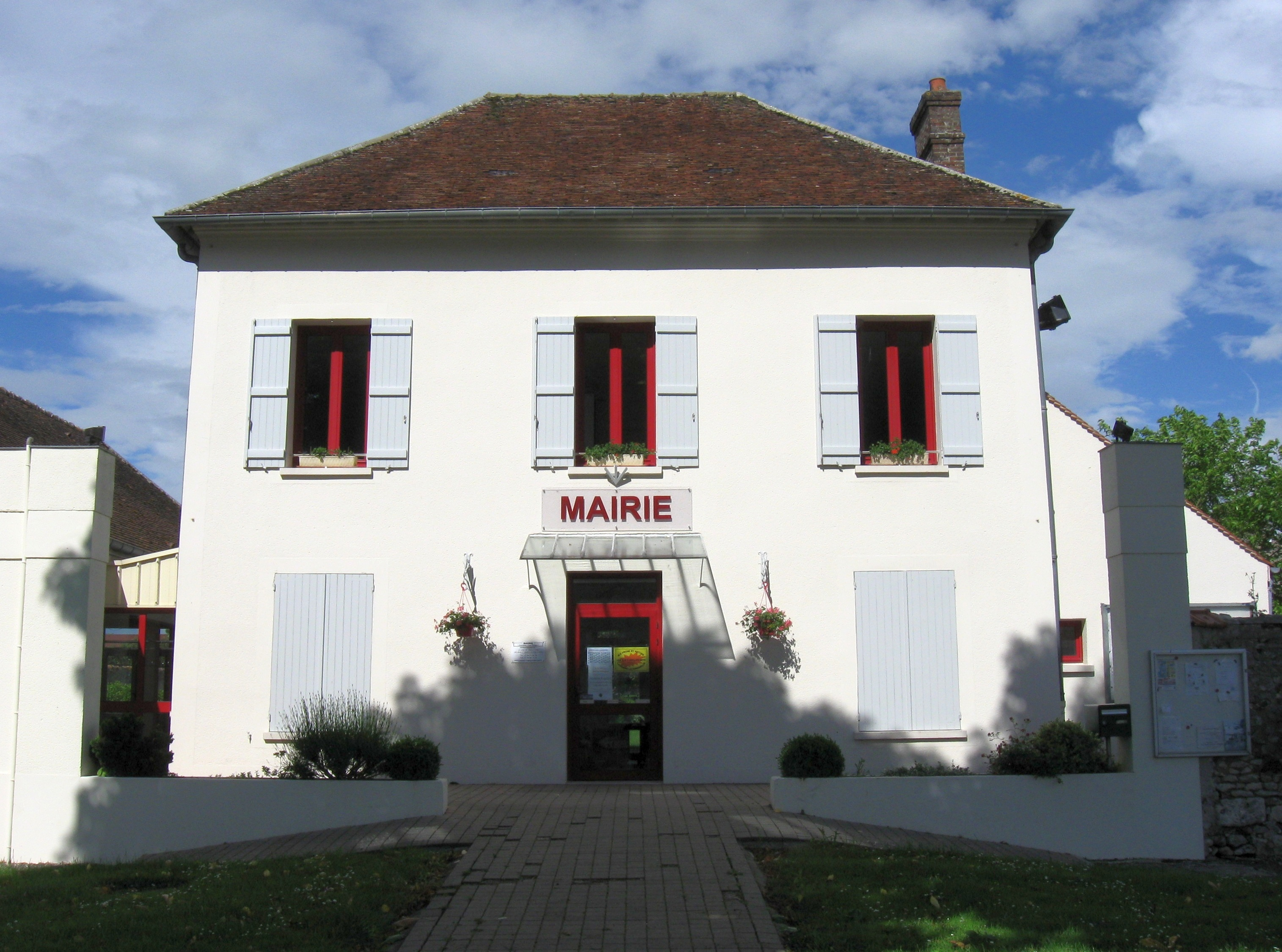 Mairie de Bannost-Villegagnon. (Seine-et-Marne, région Île-de-France).